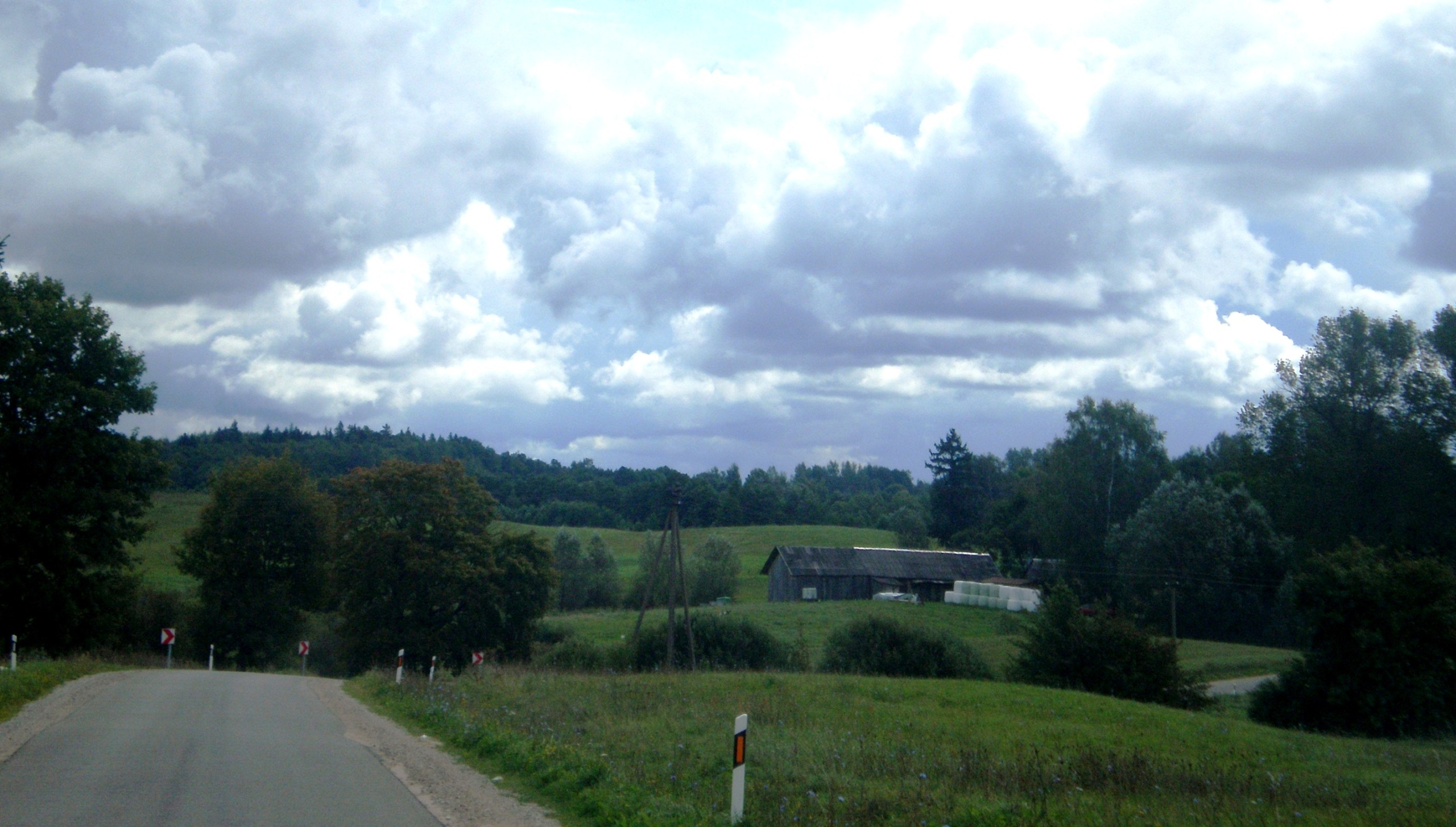 Akuočiai, Lazdijų raj.